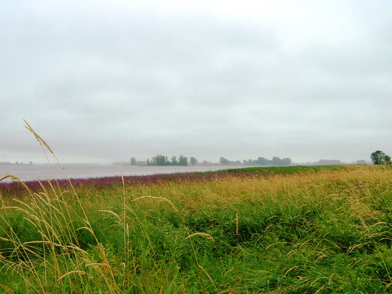 Les battures de l'île Lebel au fleuve Saint-Laurent à Repentigny (Québec)